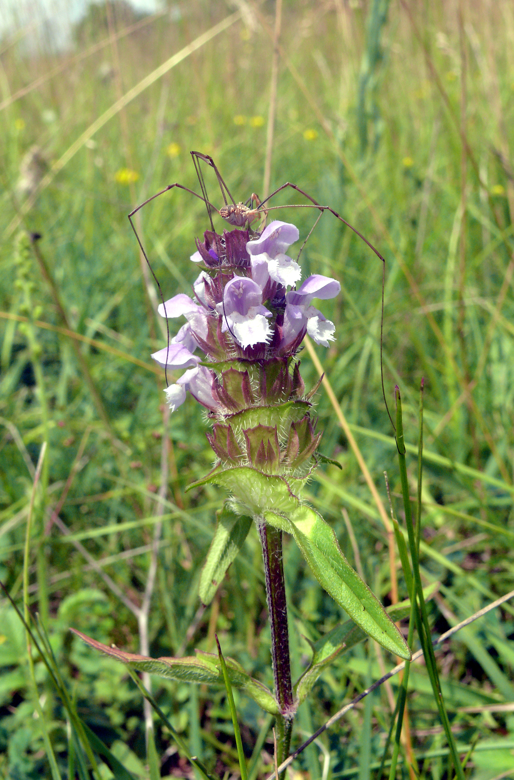 Prunella × intermedia, Hohenlohe